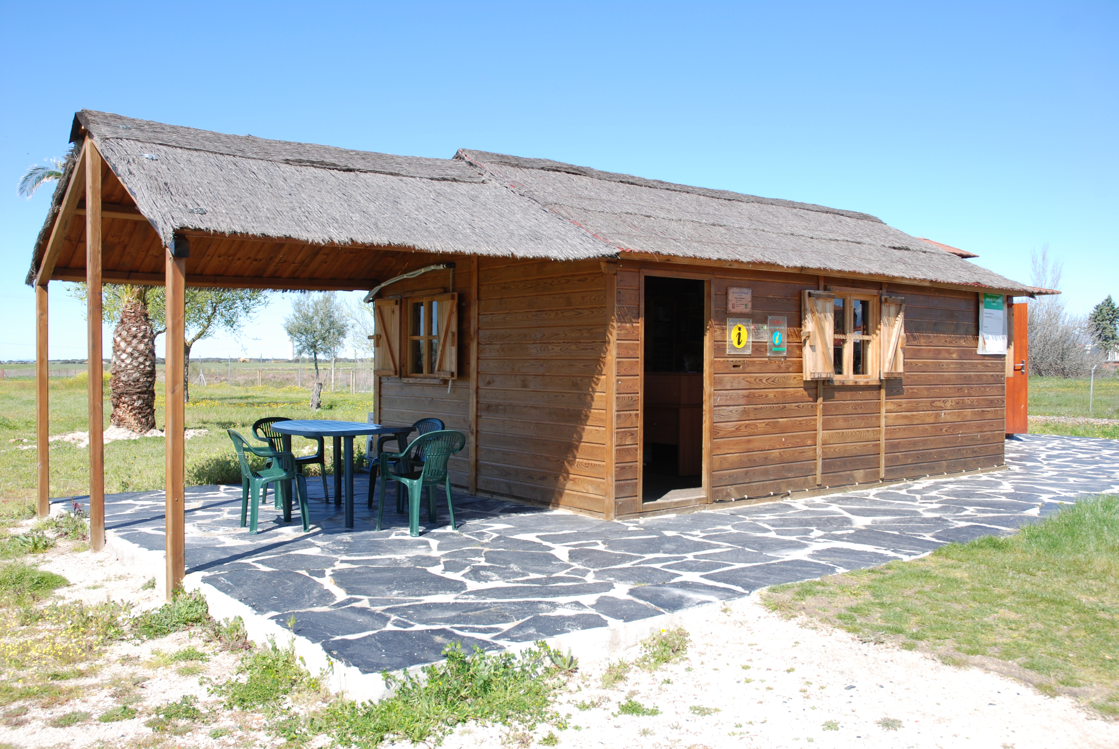 Oficina de Información de la ZEPA Embalse de Arrocampo y del Parque Ornitológico de Arrocampo en Saucedilla (Cáceres)